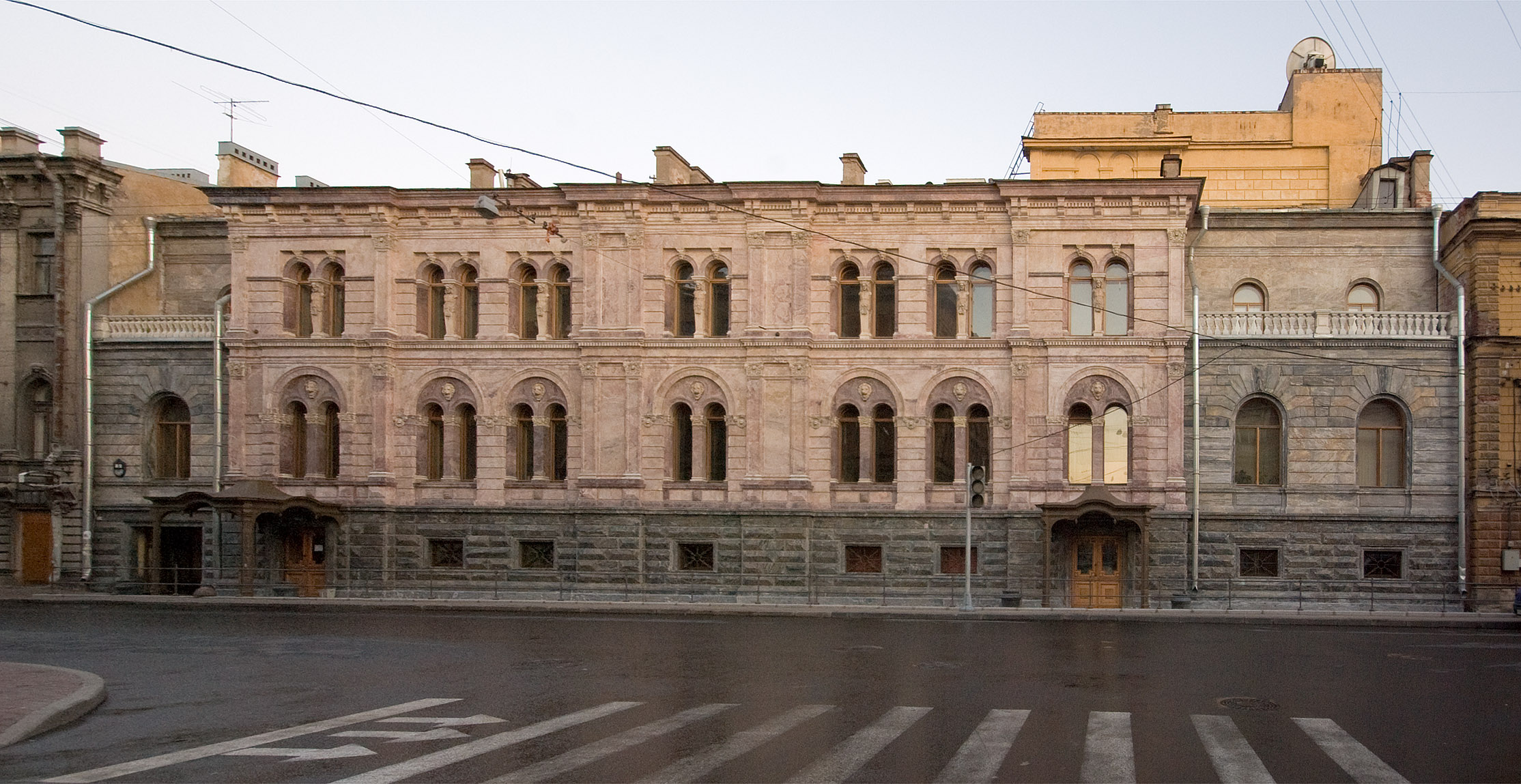 Гагаринская улица, дом 3 (Санкт-Петербург)